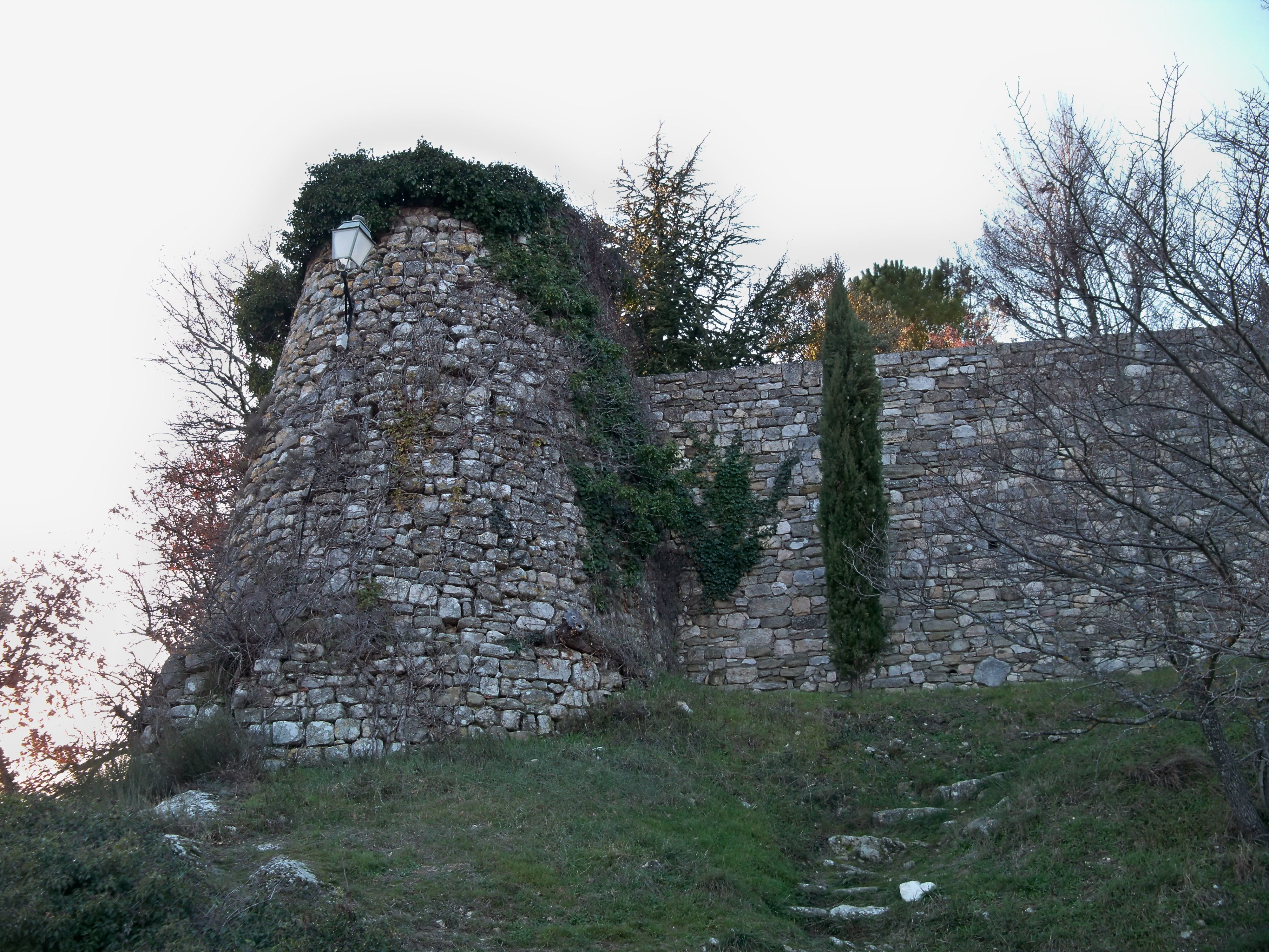 remparts de Montjustin (04), France